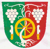 znak obce Veletiny